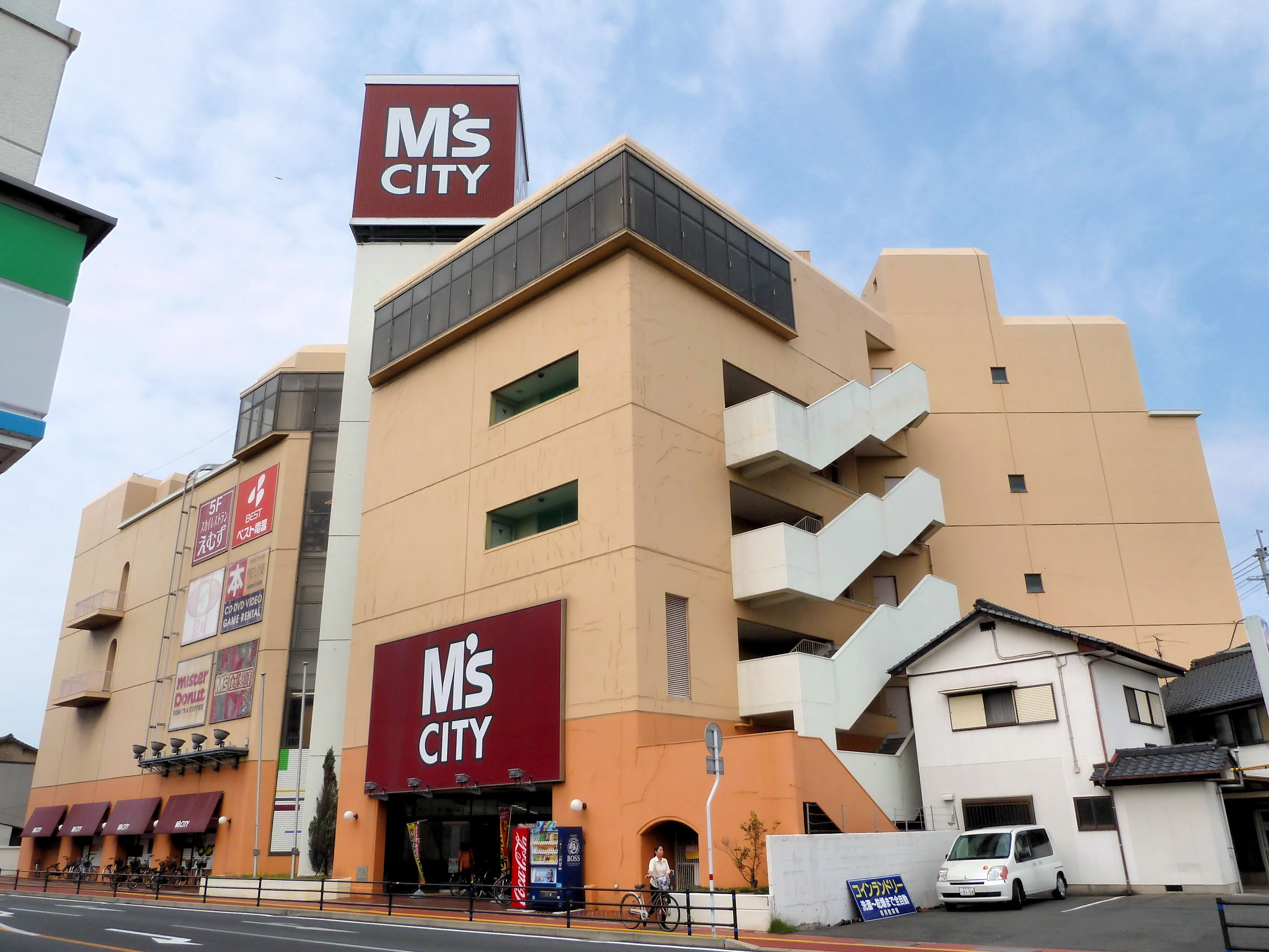 ショッピングセンター「水光社エムズシティ」。熊本県水俣市「エムズシティ」前にて撮影。